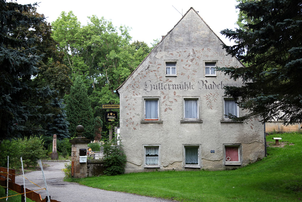 Hüttermühle Radeberg